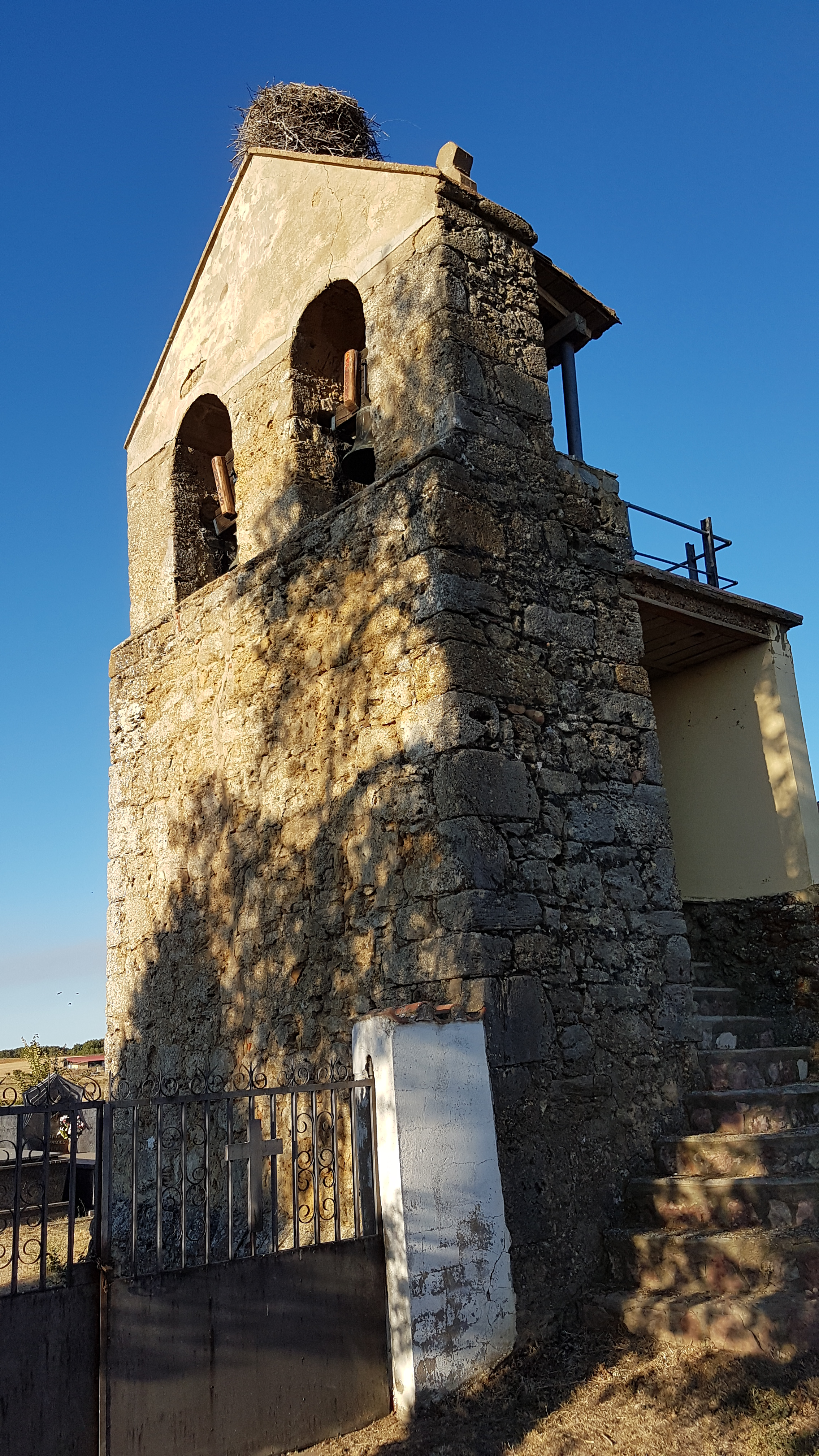 Iglesia de San Esteban de Solanilla